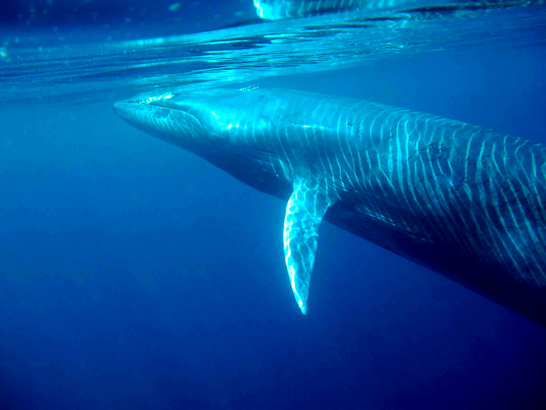 Begegnung mit einem Brydewal (Balaenoptera brydei), Koh PhiPhi, Thailand. – Dieser adulte Wal (ca. 8m) durchbricht gerade die Meeresoberfläche, um „abzublasen“. Welch überraschendes und beeindruckendes Erlebnis, einem solch imposanten Säugetier zu begegnen.